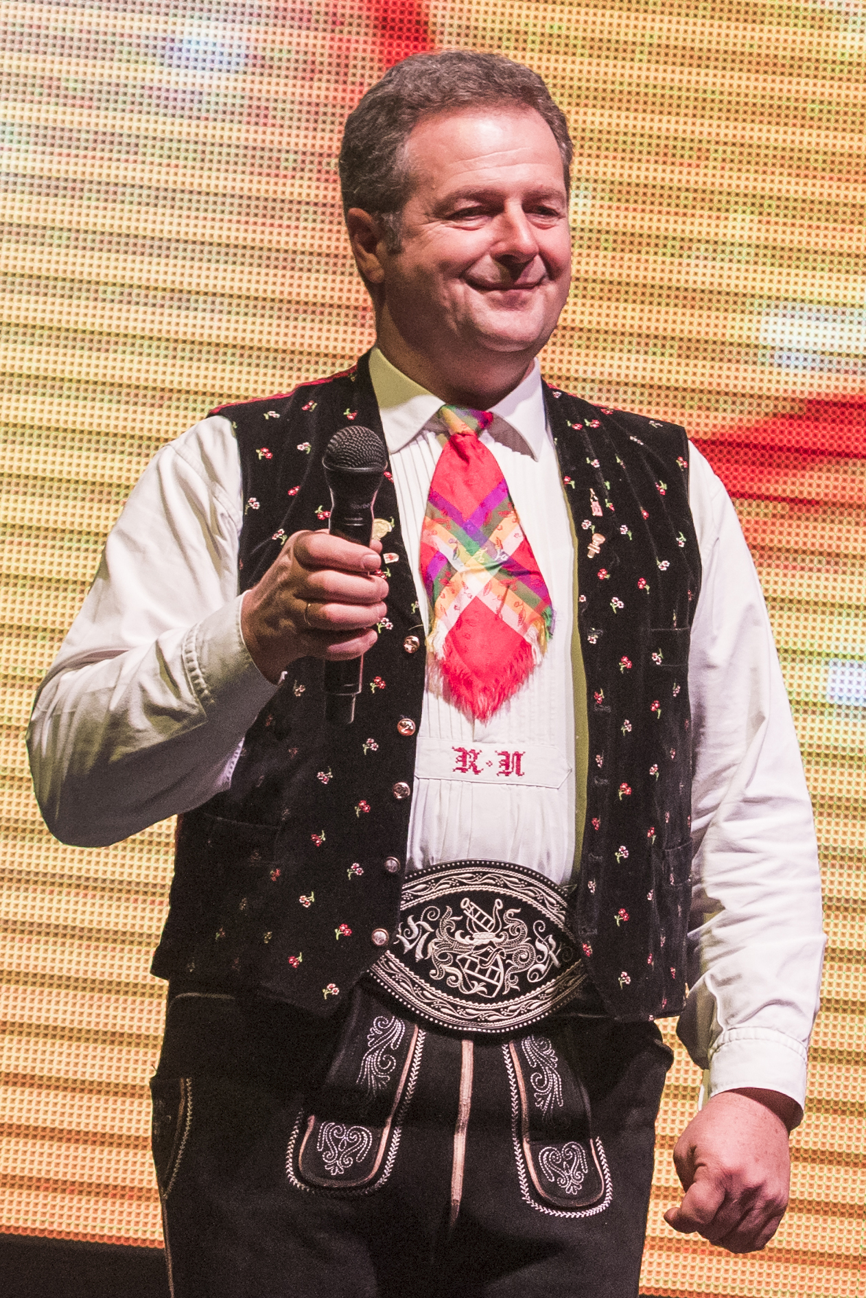 Norbert Rier, Frontmann der Kastelruther Spatzen, bei einem Konzert in der Jahrhunderthalle Frankfurt.